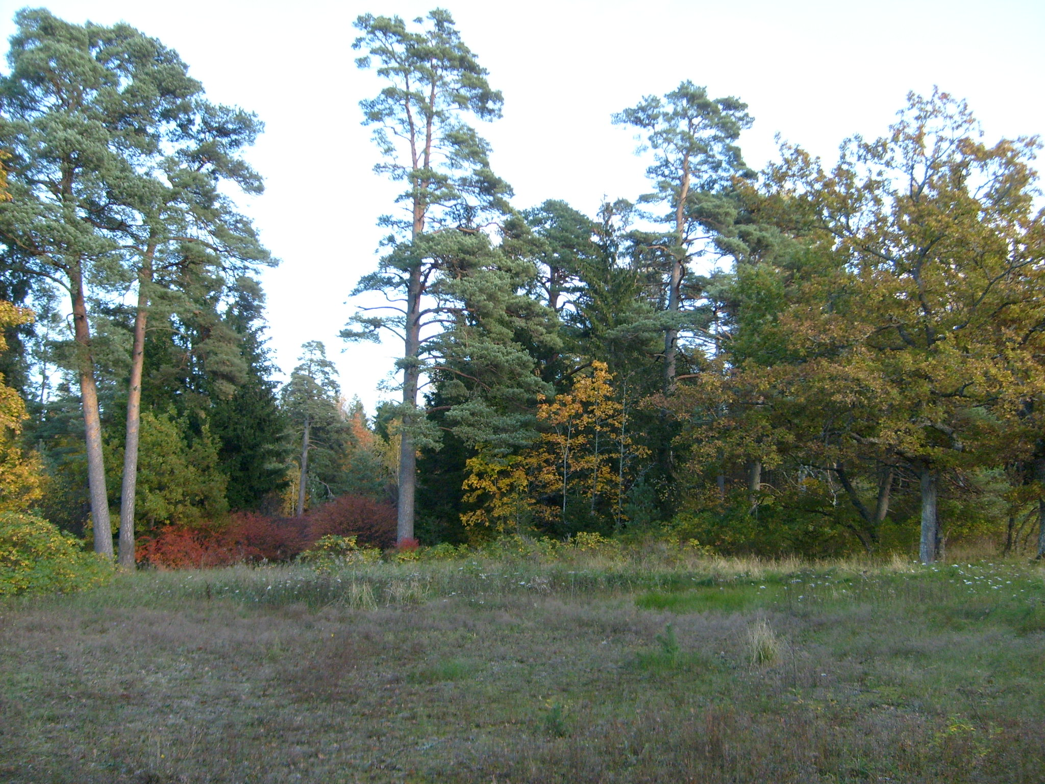 Kõltsu poolmõisa park